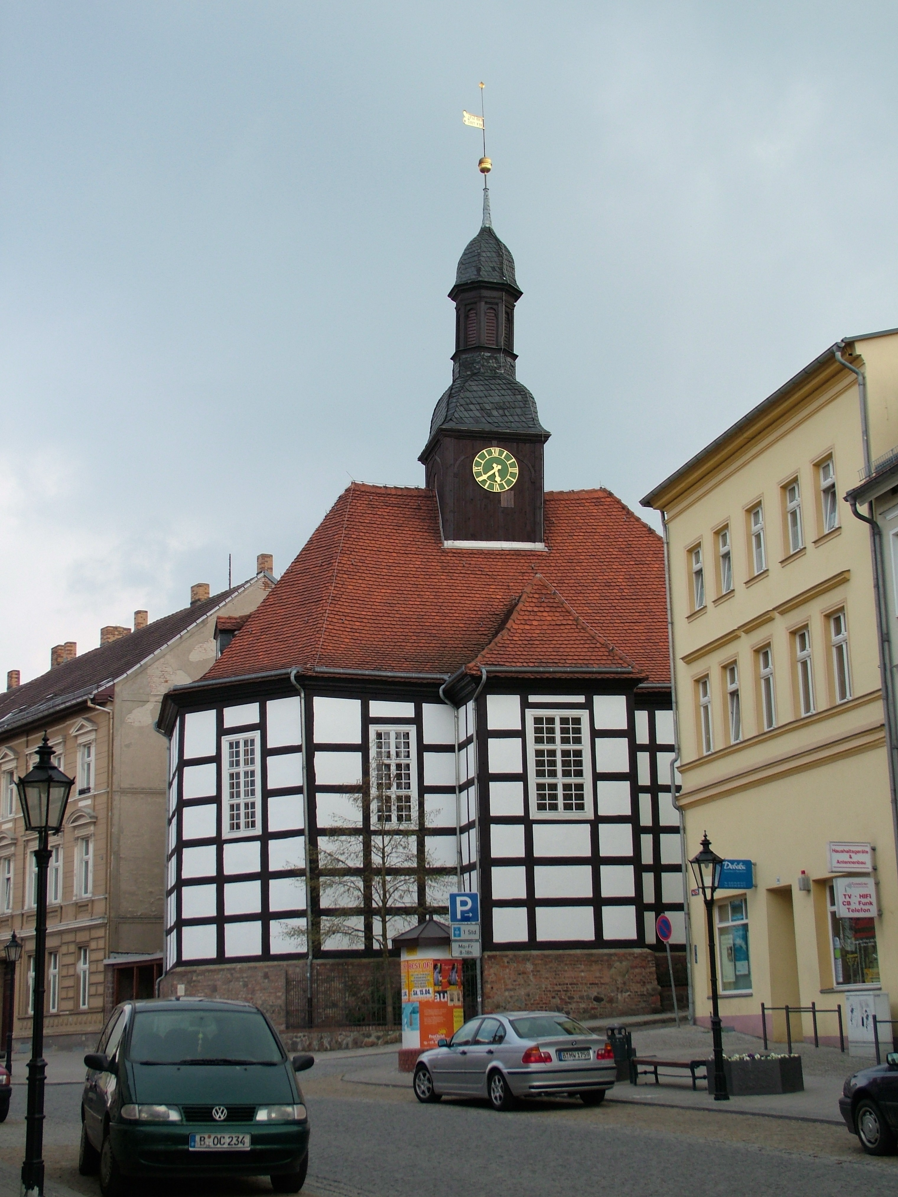 In Bad Freienwalde, Brandenburg, die Konzerthalle in der ehemaligen Georgskirche